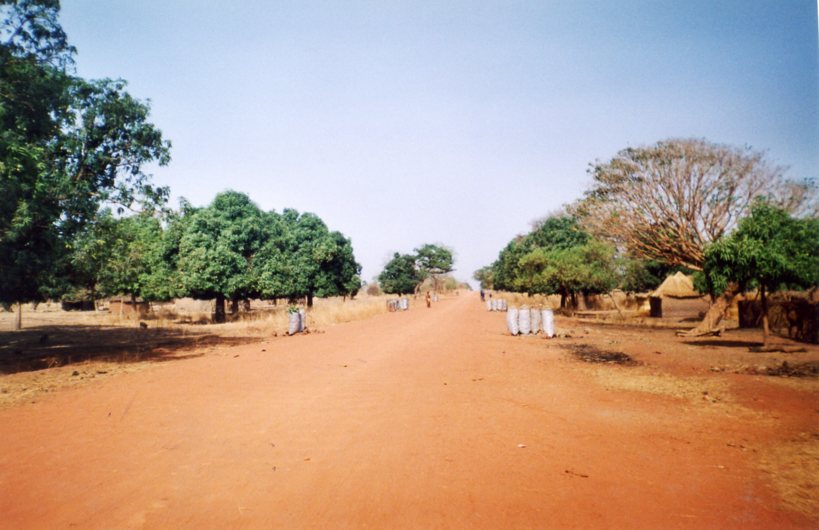 Foto personale di una pista in sud Ciad con sacchi di carbone in vendita, Aprile 2004